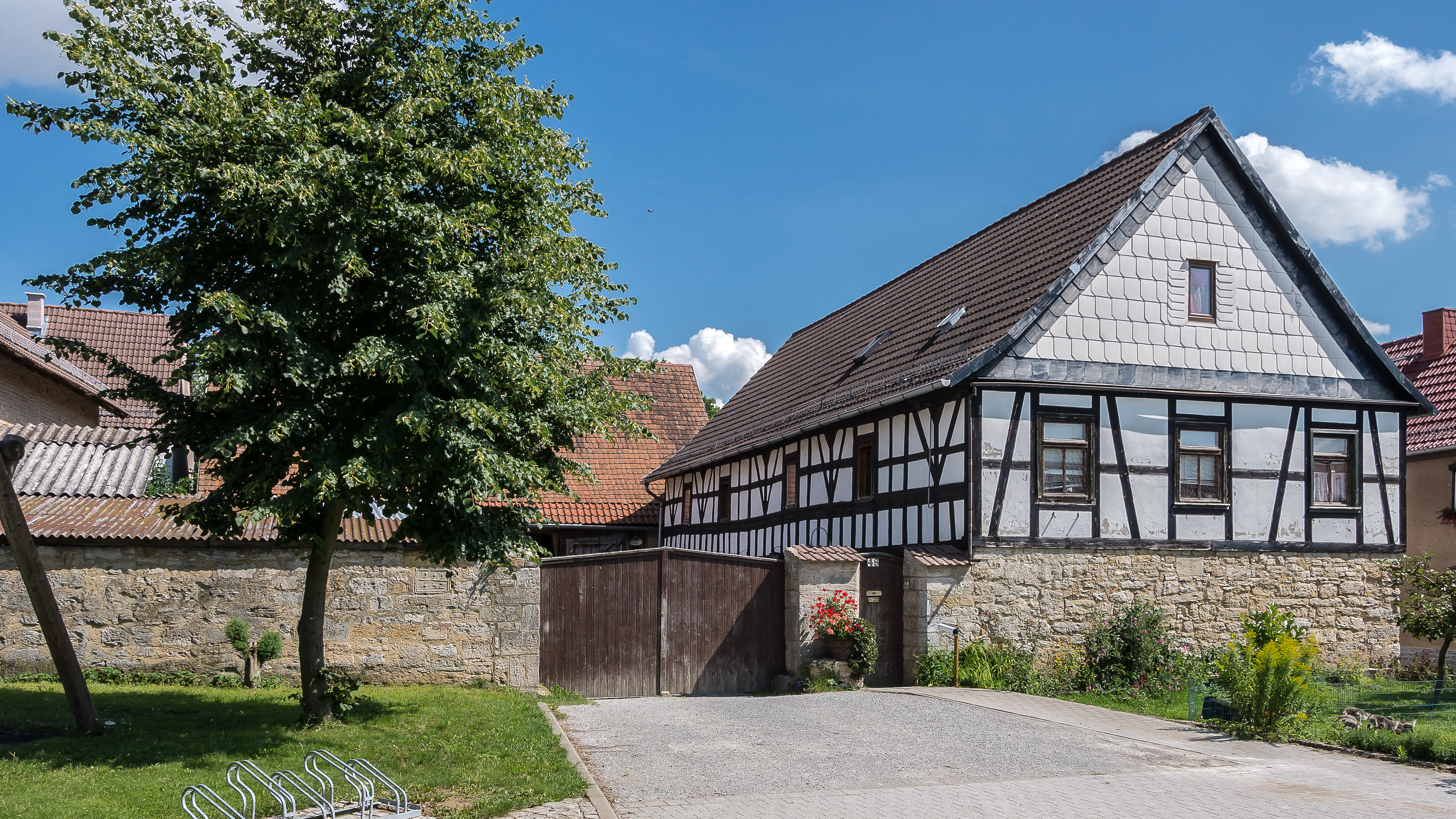 Rittersdorf (Thuringia) Anger 48 Teil des Denkmalensembles „Ortslage“ und auch Einzeldenkmal